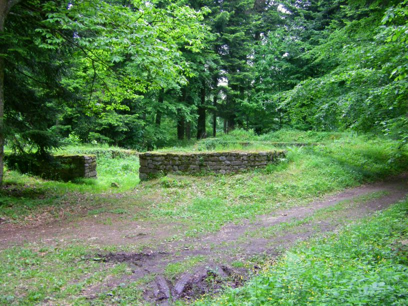 Ehemaliges Kloster Schwarzenthann